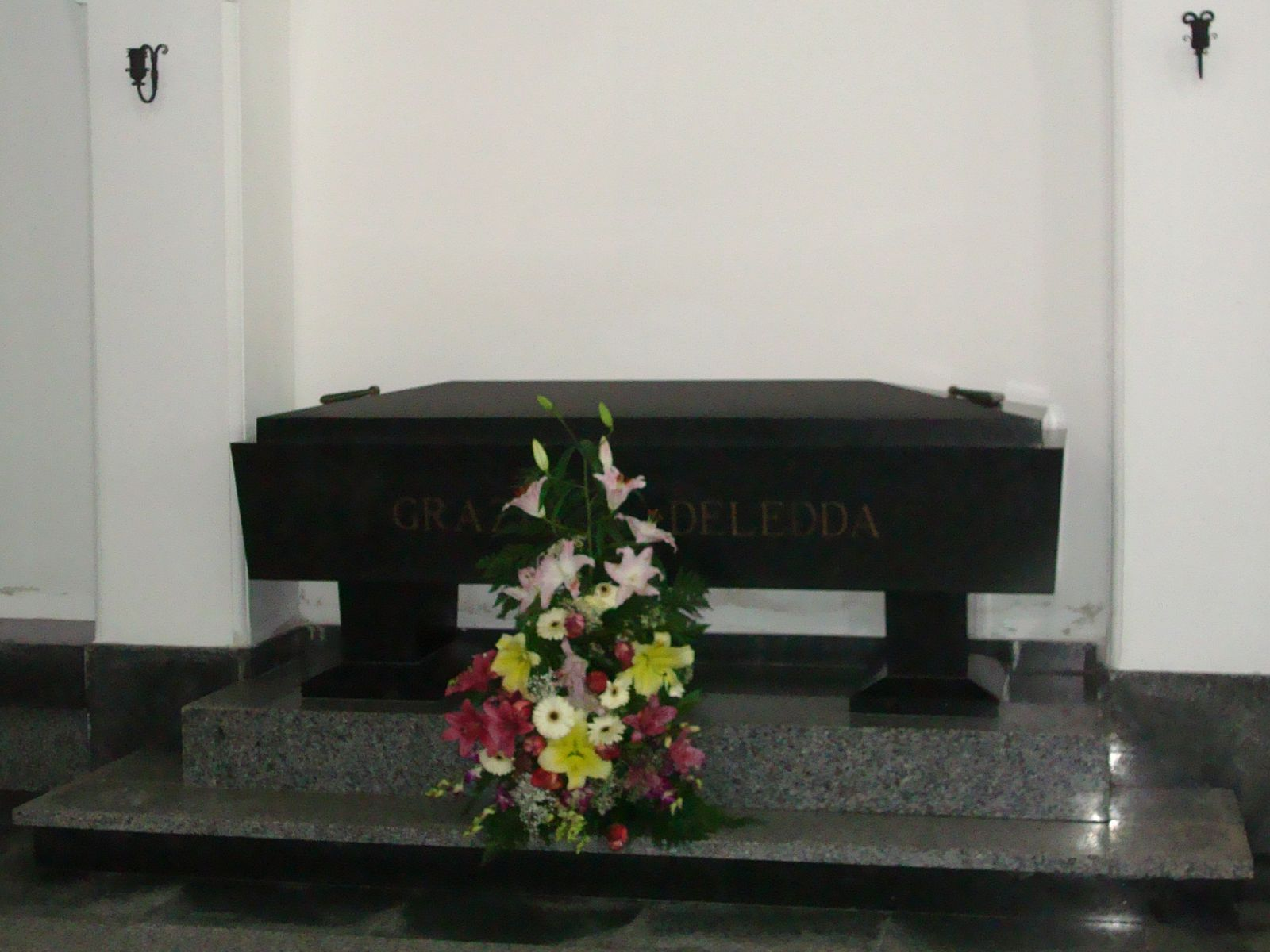 Sepolcro della scrittrice premio nobel Grazia Deledda all'interno della chiesetta della Madonna della Solitudine a Nuoro.